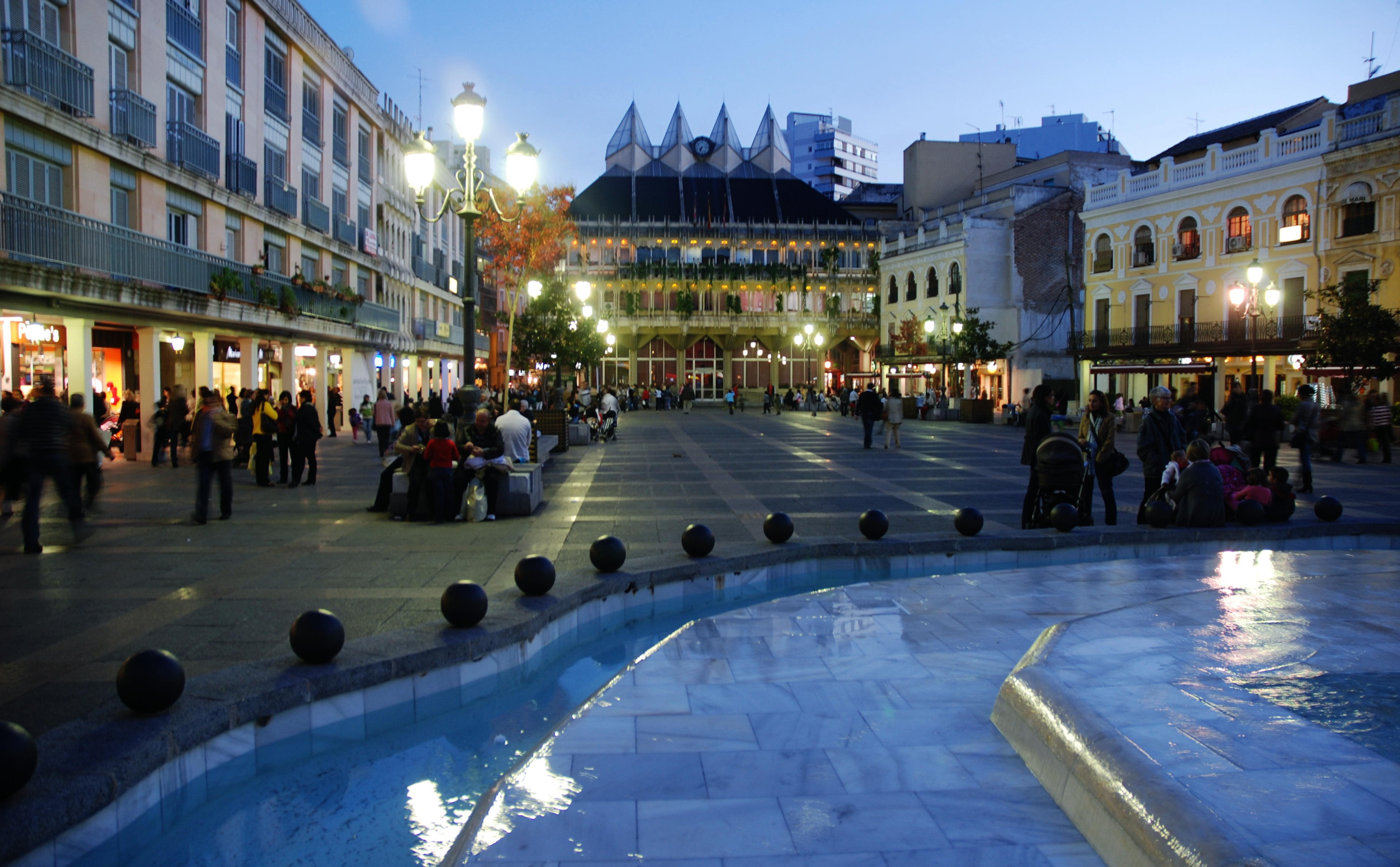 Vista de la Plaza de Mayor de Ciudad Real al atardecer una fría tarde de octubre.